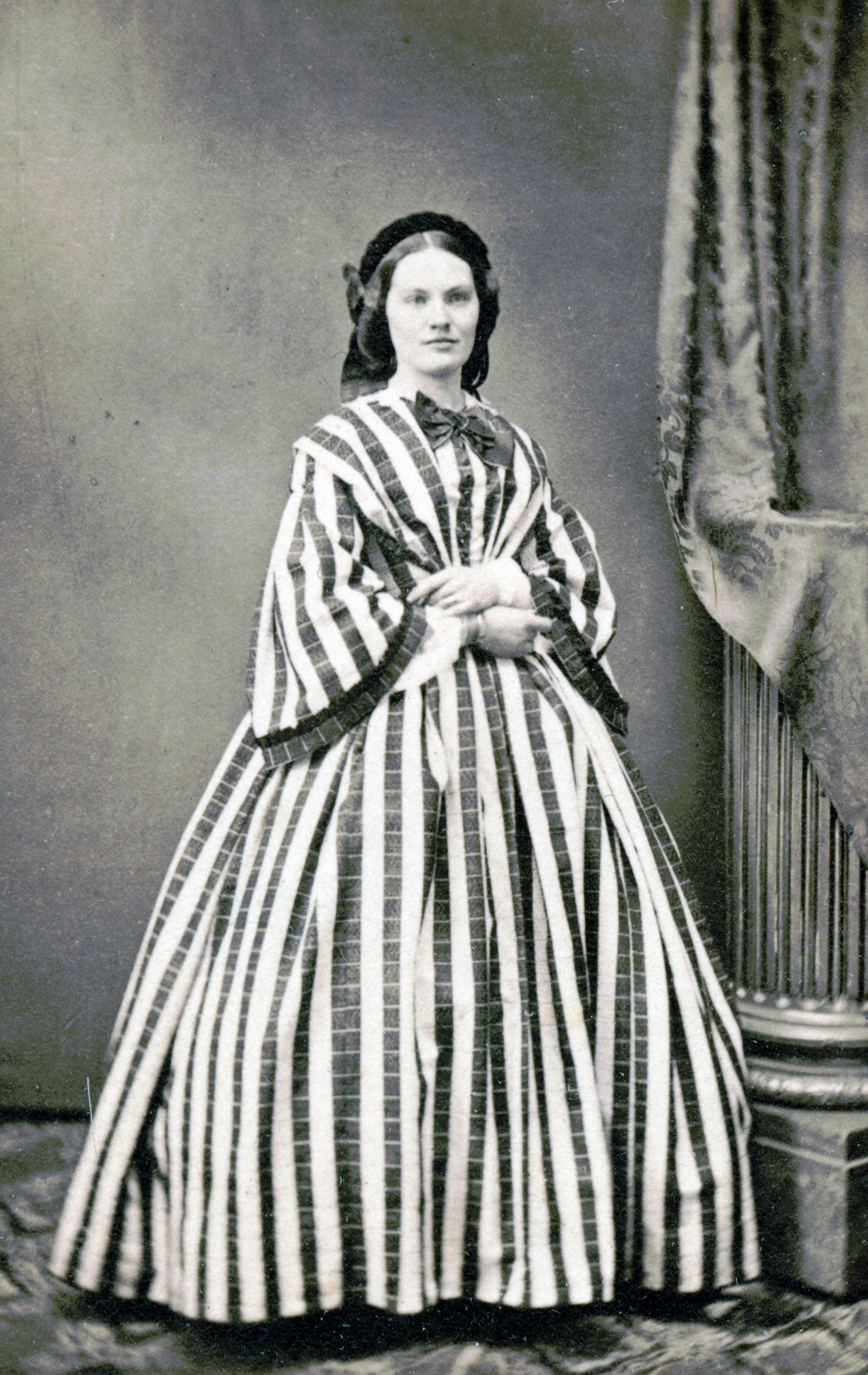 Clara Fornell, porträtt från 1860-talet